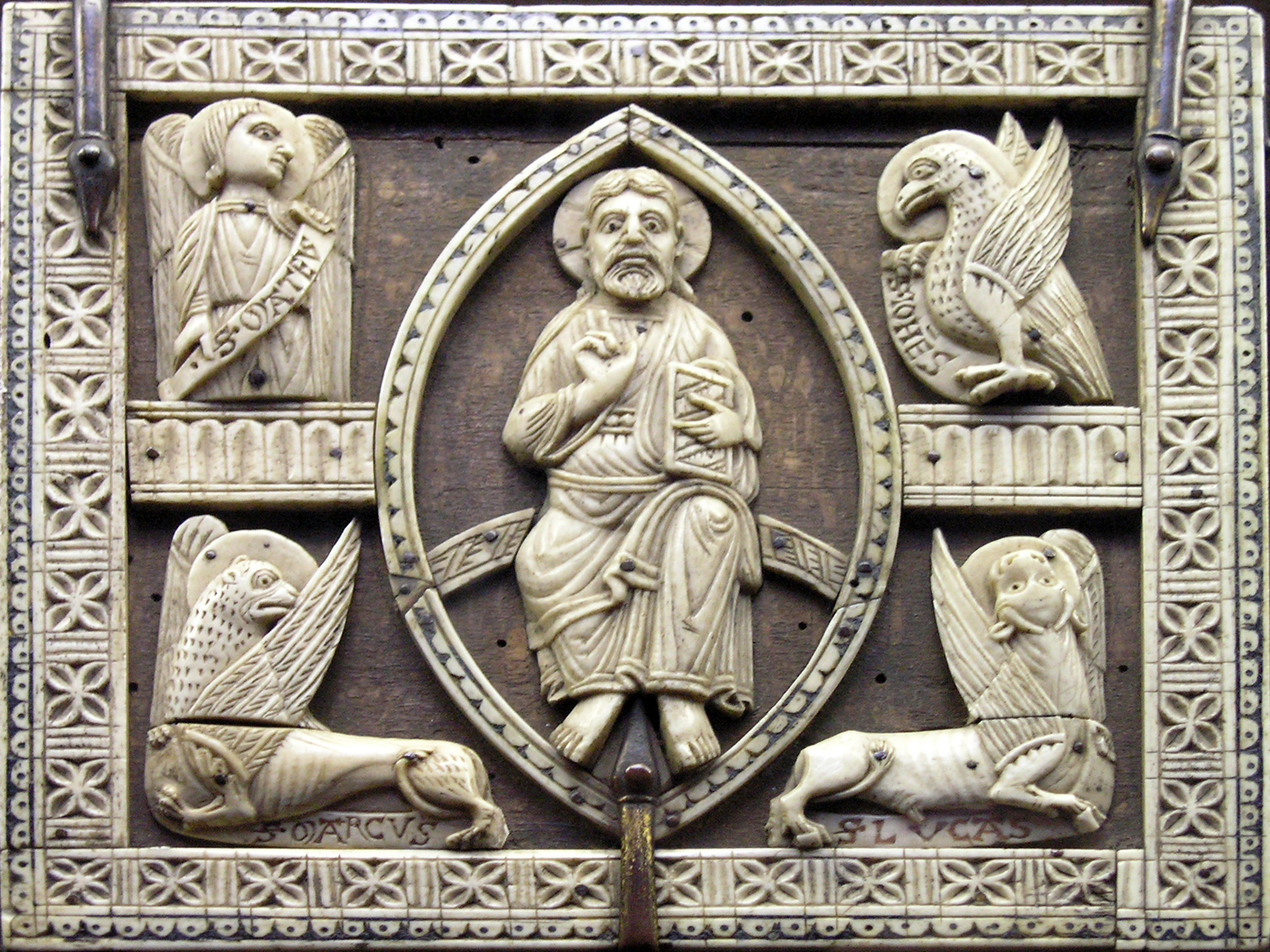 Couvercle d'un coffret en ivoire d'éléphant portant la représentation du Christ en Majesté entre les quatre évangélistes. Cologne, première moitié du XIIIe s. Ivoire.